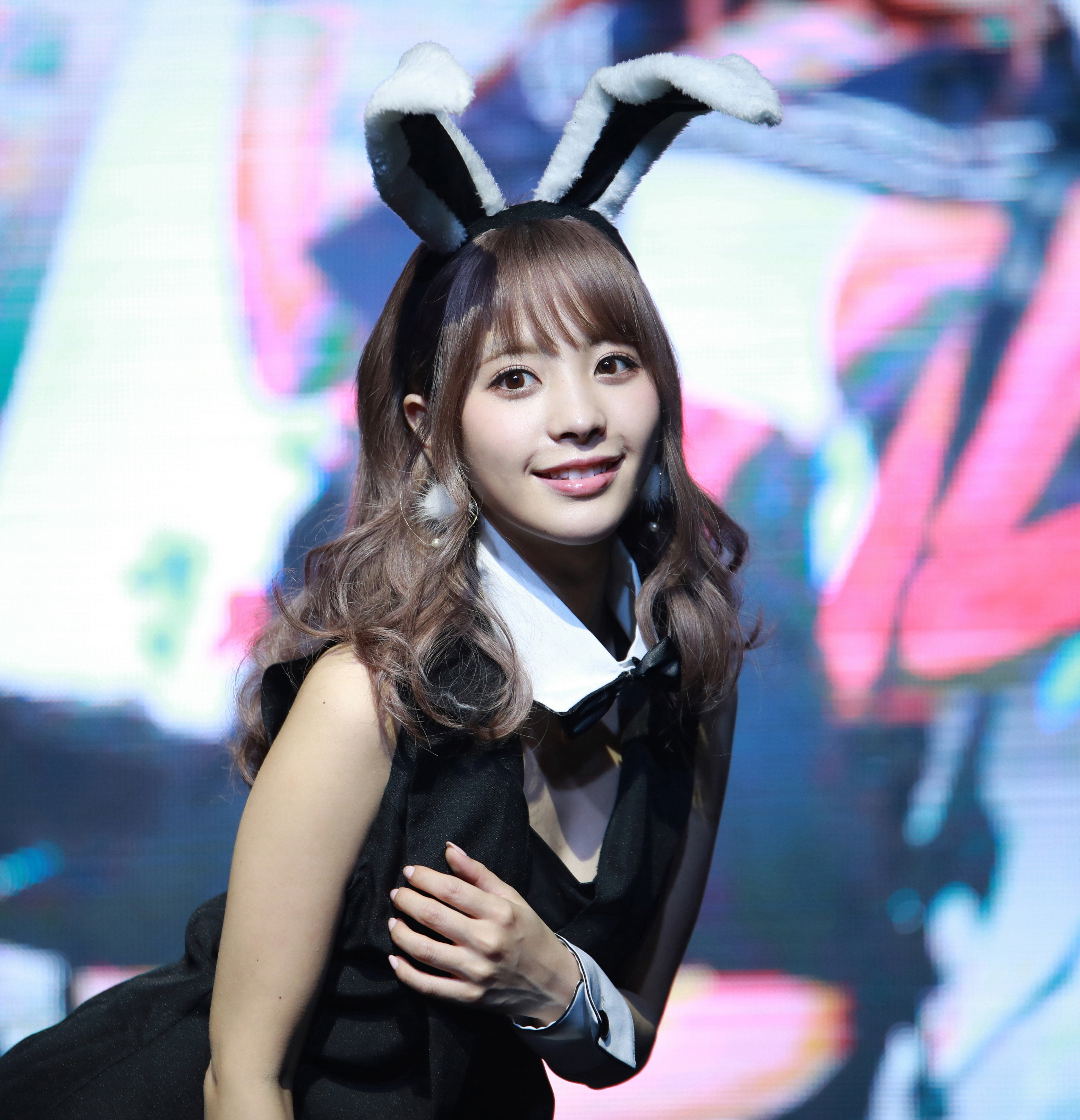 171209 桃乃木かな(모모노기 카나) 2017 FAN MEETING in SEOUL (First Kiss)2部 写真 ♡桃乃木かな♡